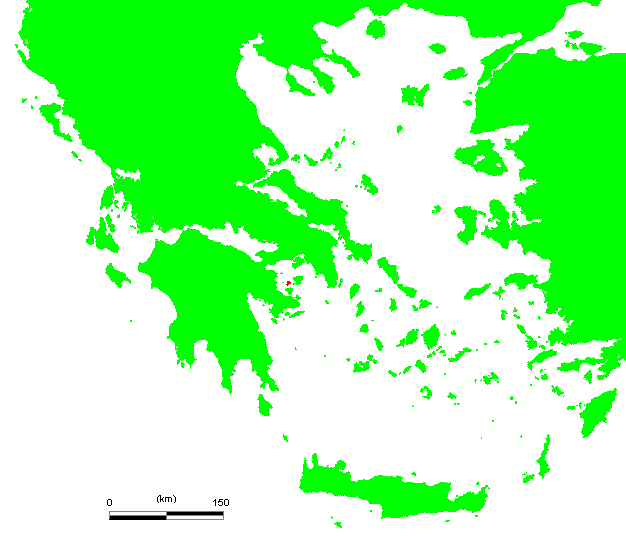 GR Angistri.PNG (Greek island)